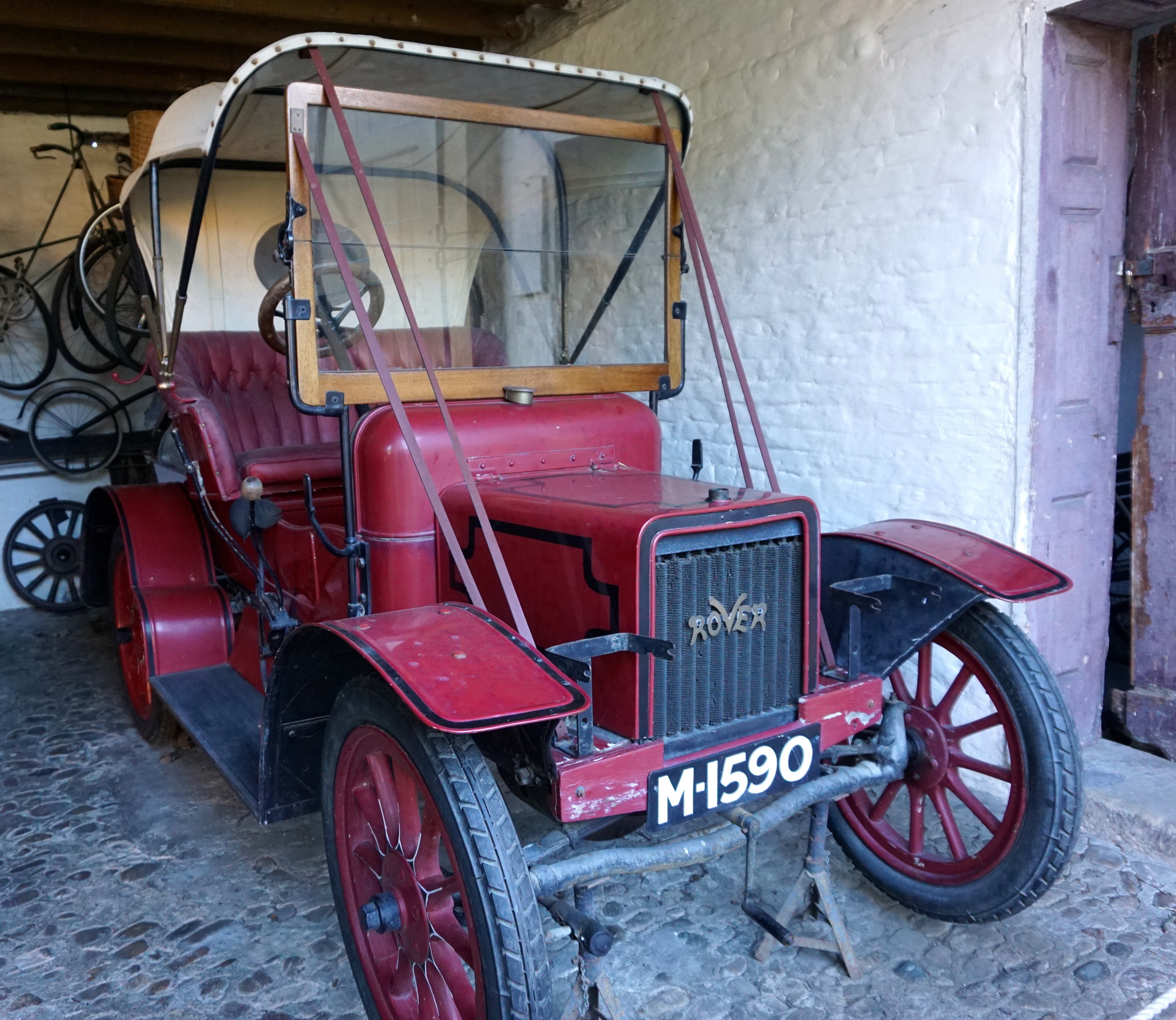 1907 Rover 8 Erddig, Wrexham, North Wales